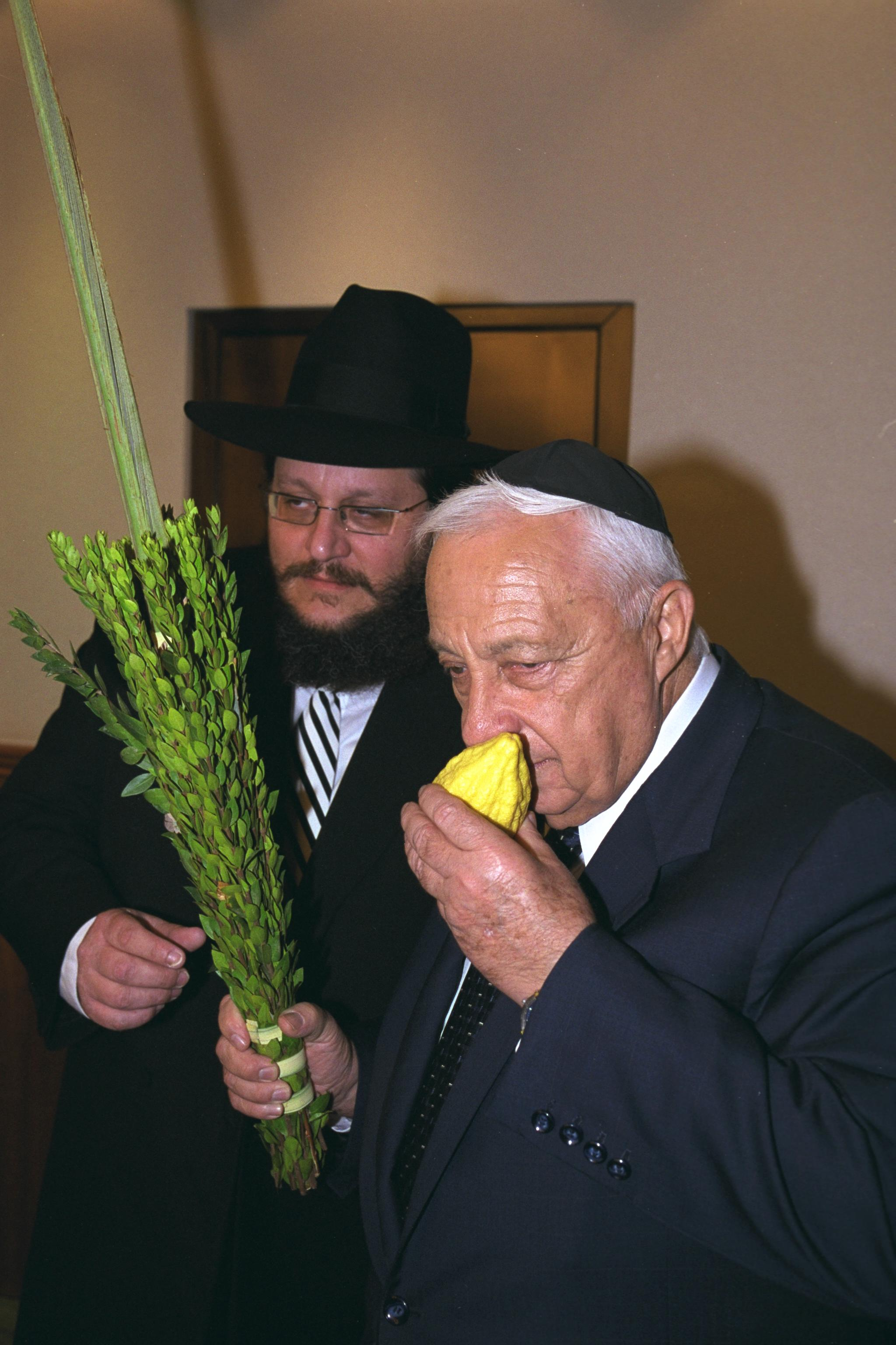 Prime Minister Ariel Sharon smells a citron he received from Chabad Hassidim on the Sukkot holiday at his bureau in Jerusalem. GPO photo by Ohayon Avi. ראש הממשלה אריק שרון מריח אתרוג שקיבל לכבוד חג הסוכות מחסידי חב"ד, בלשכתו בירושלים.